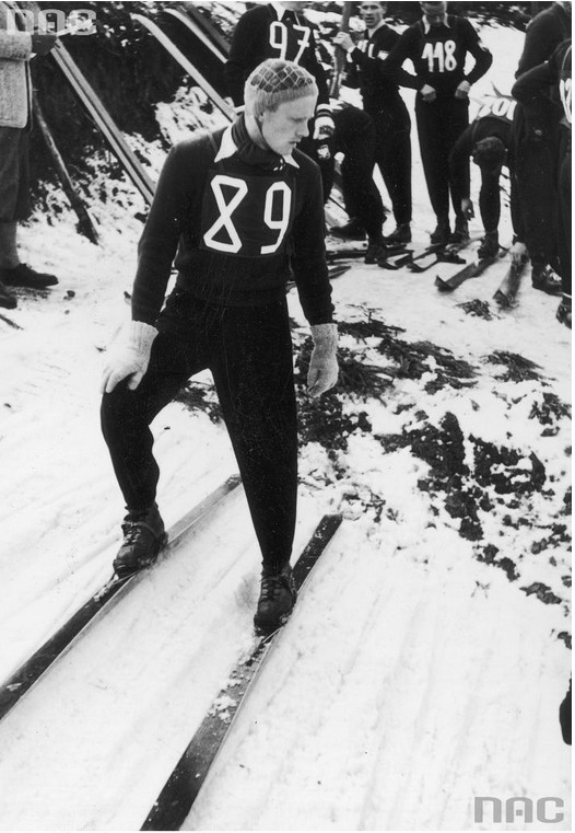 Gustav Berauer lors des championnats du monde à Zakopane en 1939